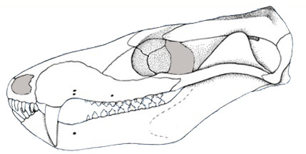 Brasilodon skull